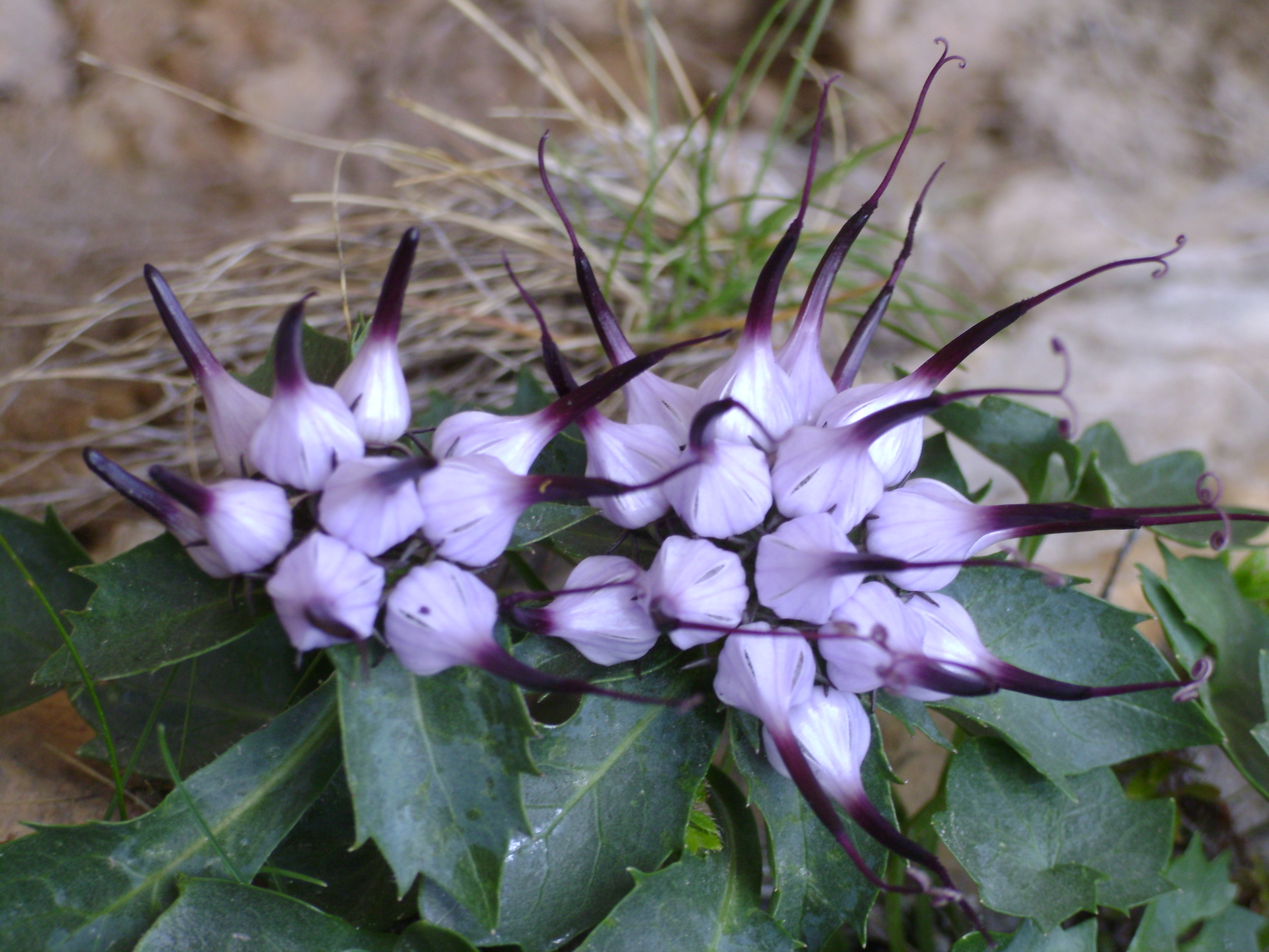 Schopfige Teufelskralle (Physoplexis comosa, auch Phyteuma comosa)